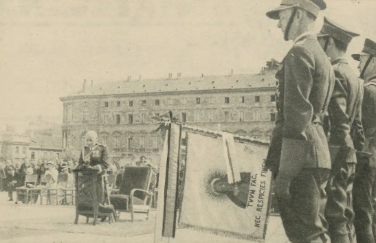 Uroczysta Msza Św. na placu Józefa Piłsudskiego w Warszawie w ramach 25-lecia wymarszu patrolu Beliny.